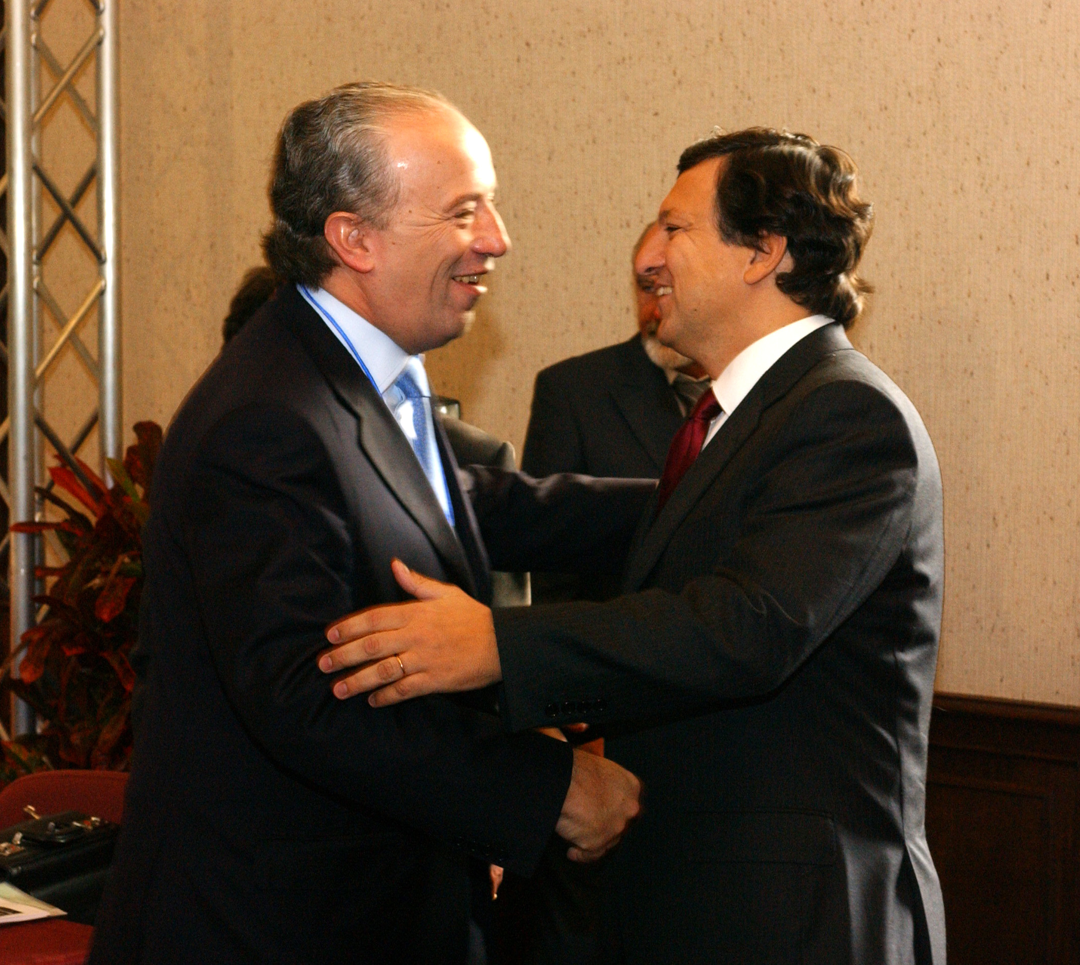 EPP Summit Meise 4 November 2004